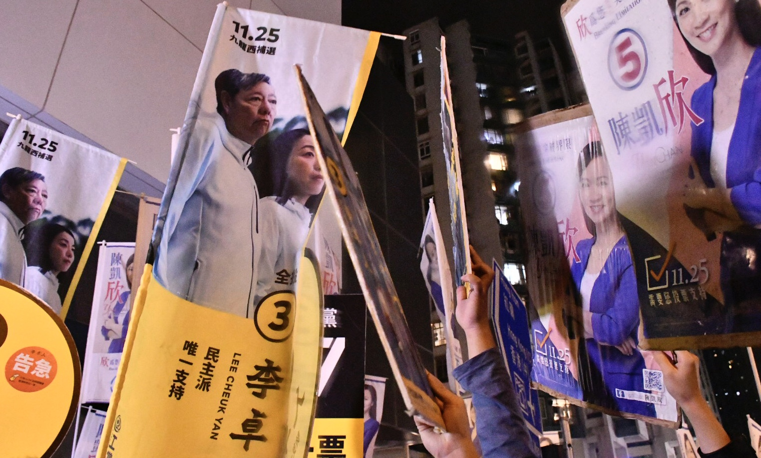 民主、建制兩大陣營候選人團隊投票最後階段拉票時短兵相接。(美國之音湯惠芸攝）